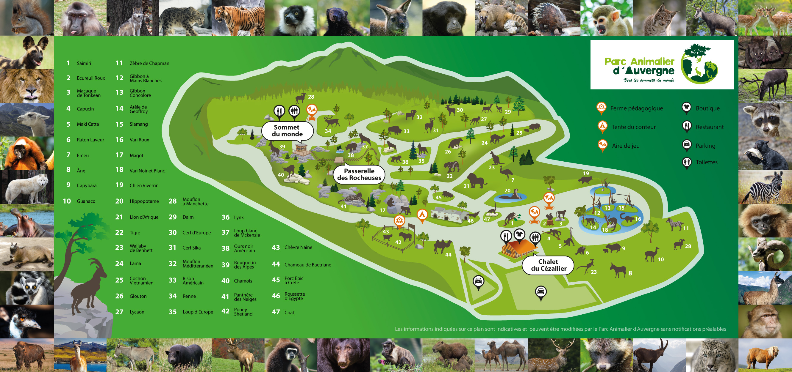 Plan Parc Animalier d'Auvergne 2013